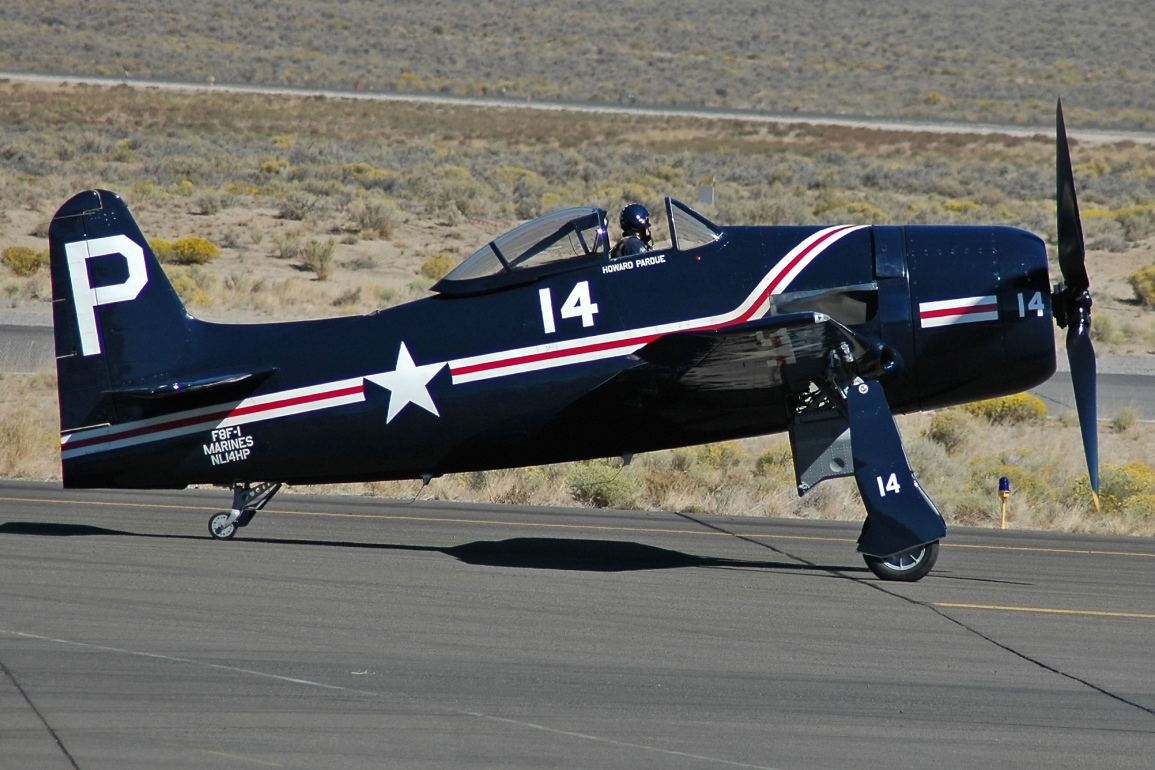 Grumman F8F-1 Bearcat in Reno/Nevada